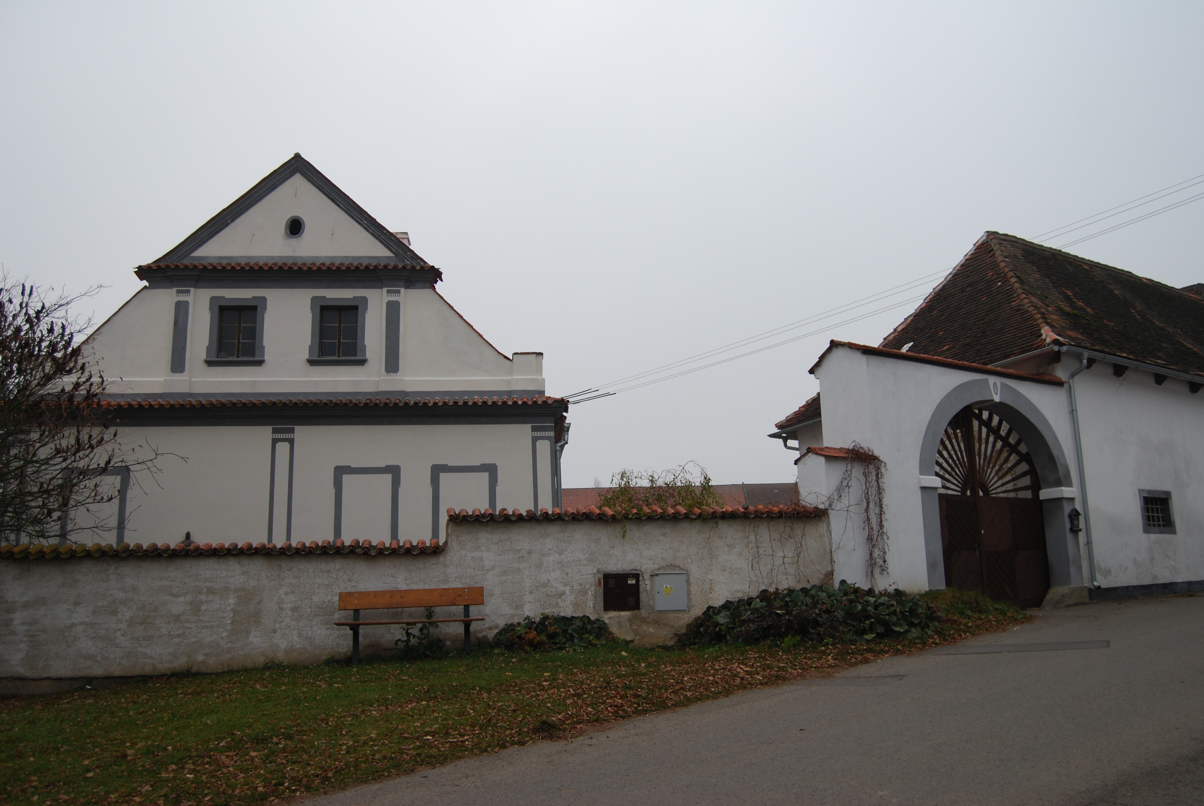 Zámek. Usedlost čp. 1. Horosedly. Okres Písek. Česká republika.